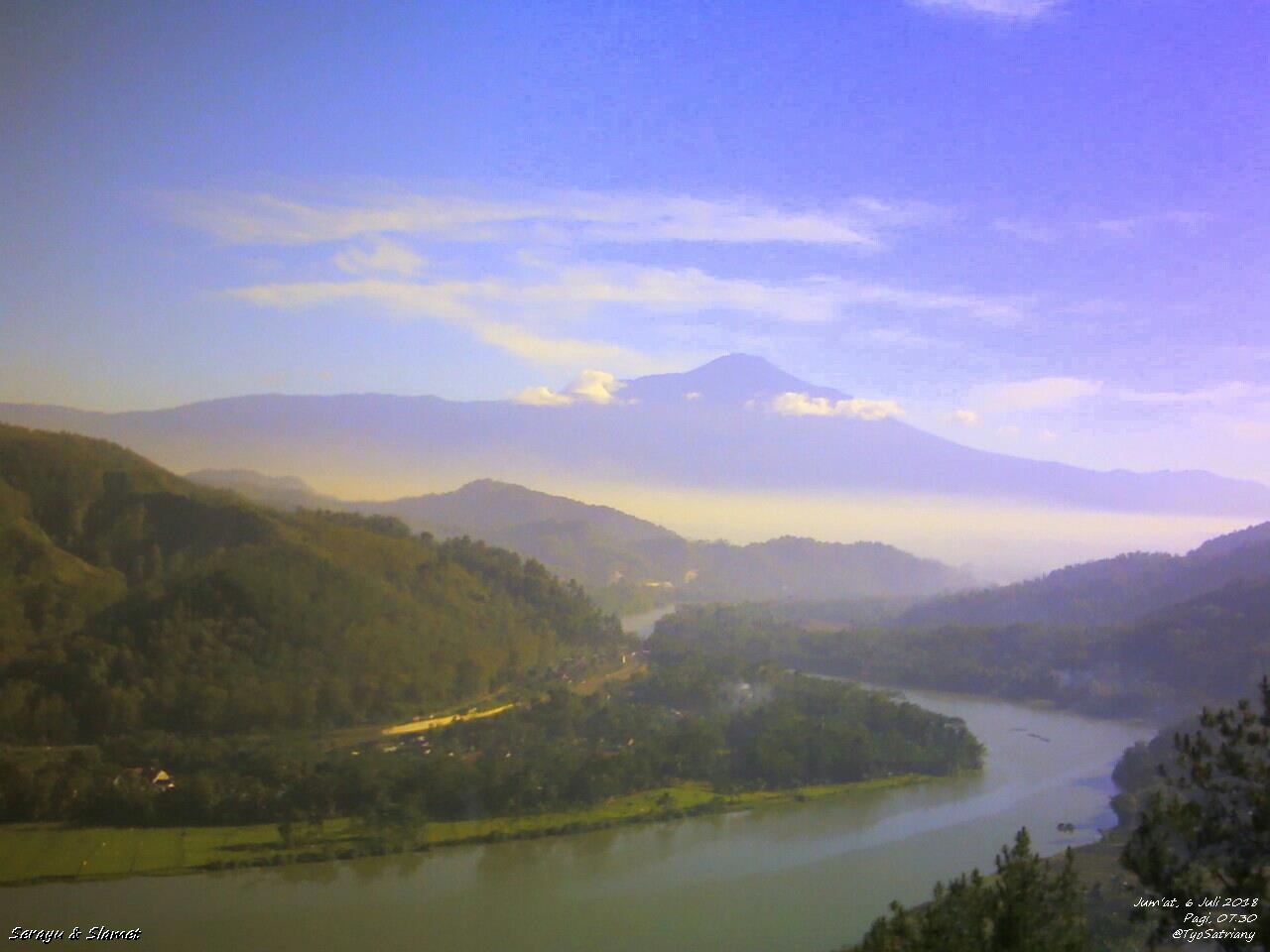 Lanskap Sungai & Gunung